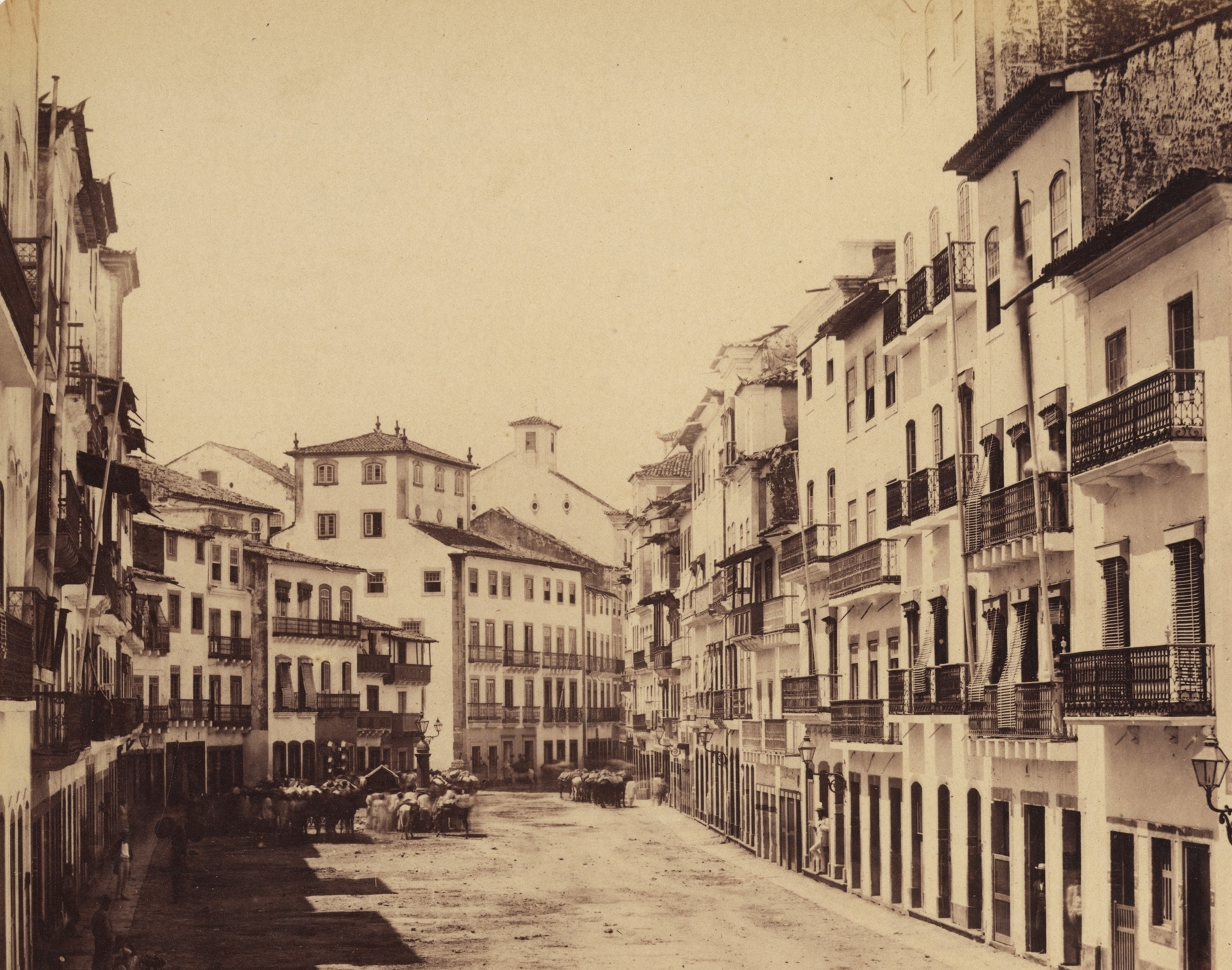 Rua dos Judeus, c. 1855 - Recife, Pernambuco, Brasil